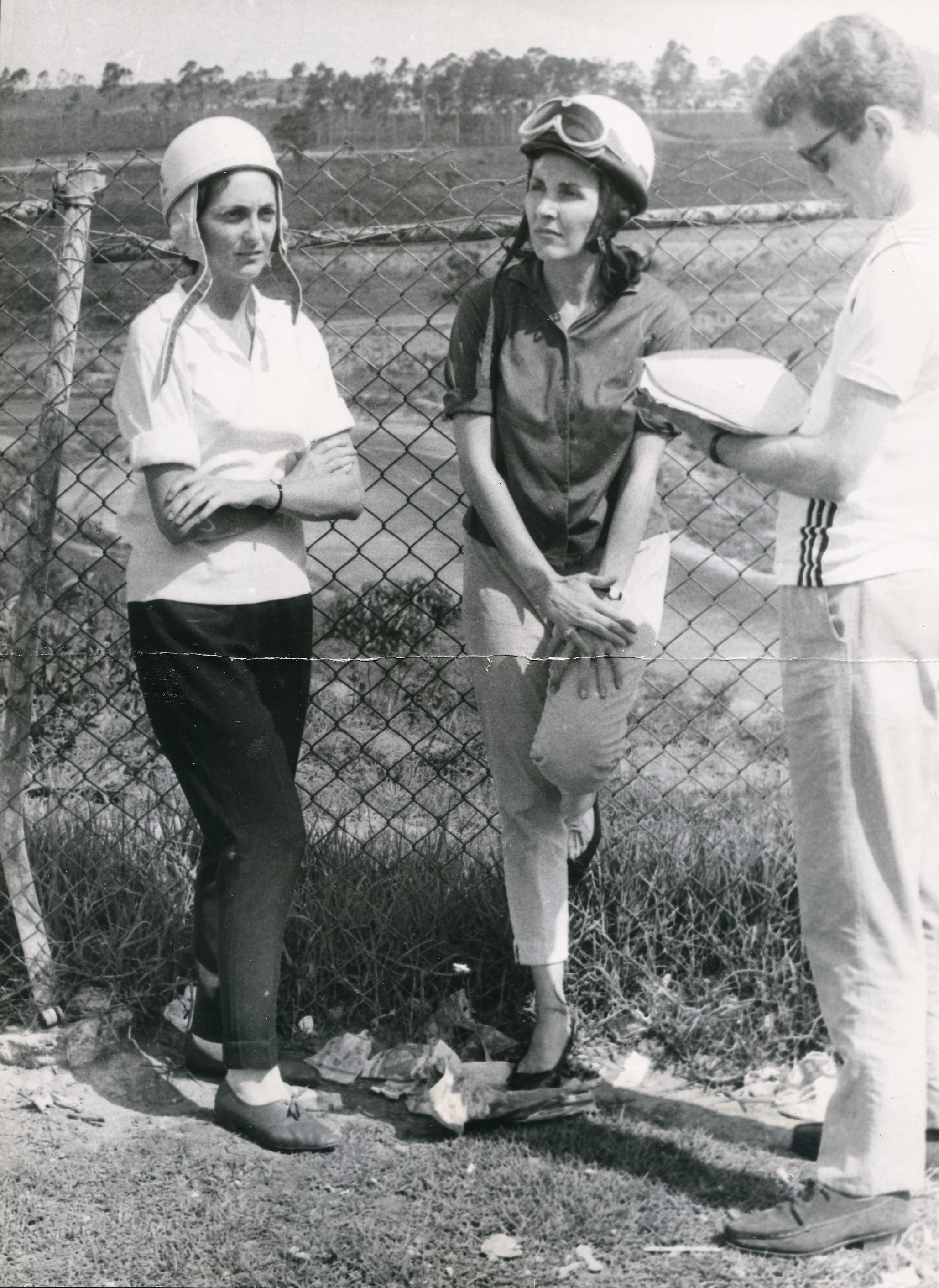 Fotografia do Fundo Correio da Manhã, sob a guarda do Arquivo Nacional.